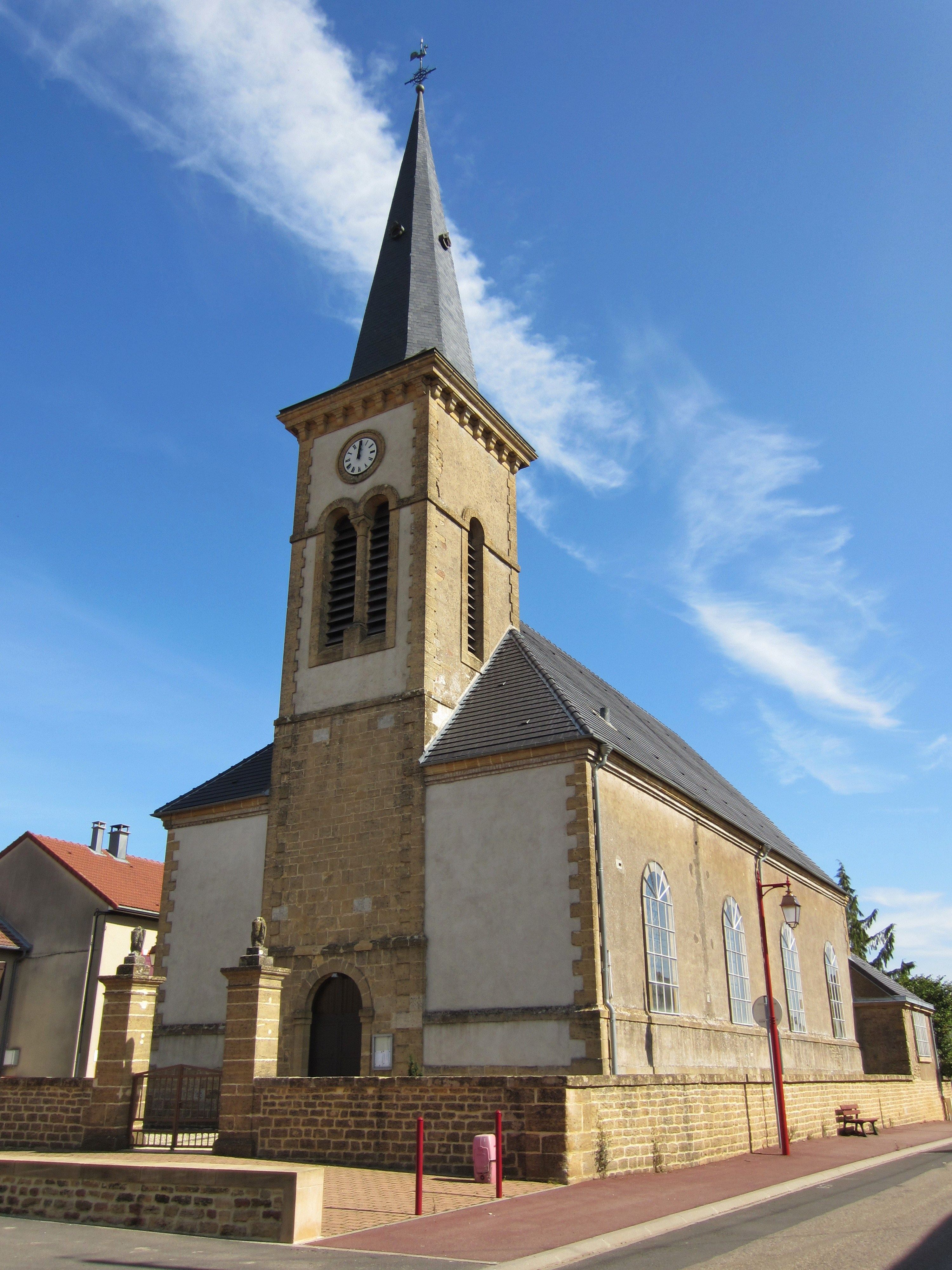 Description Église paroissiale Notre-Dame-de-l'Assomption Morfontaine Date16 September 2011Sourcemon appareil photoAuthorAimelaimePermission (Reusing this file) Église paroissiale Notre-Dame-de-l'Assomption Morfontaine